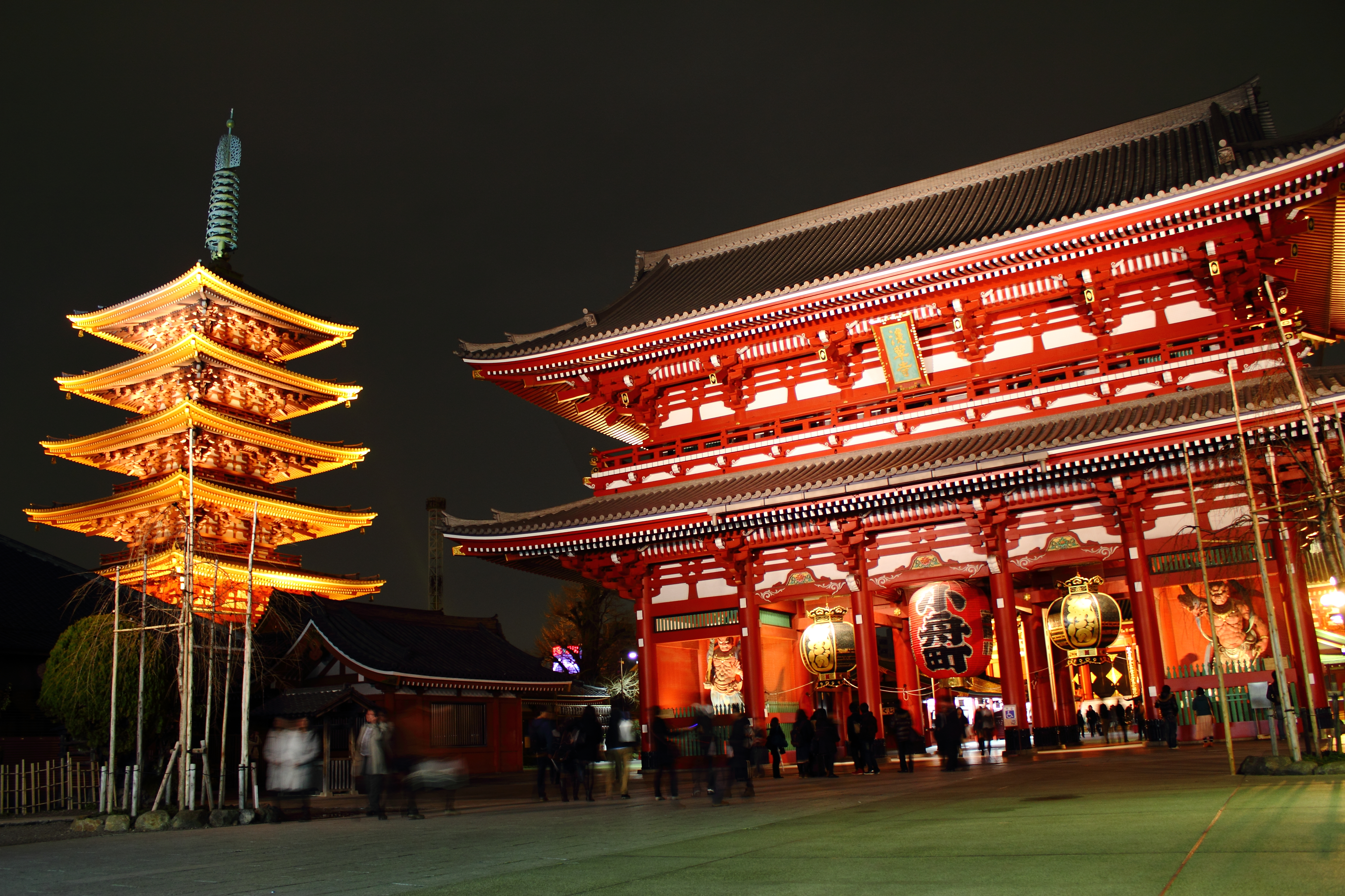 浅草寺の宝蔵門と五重塔